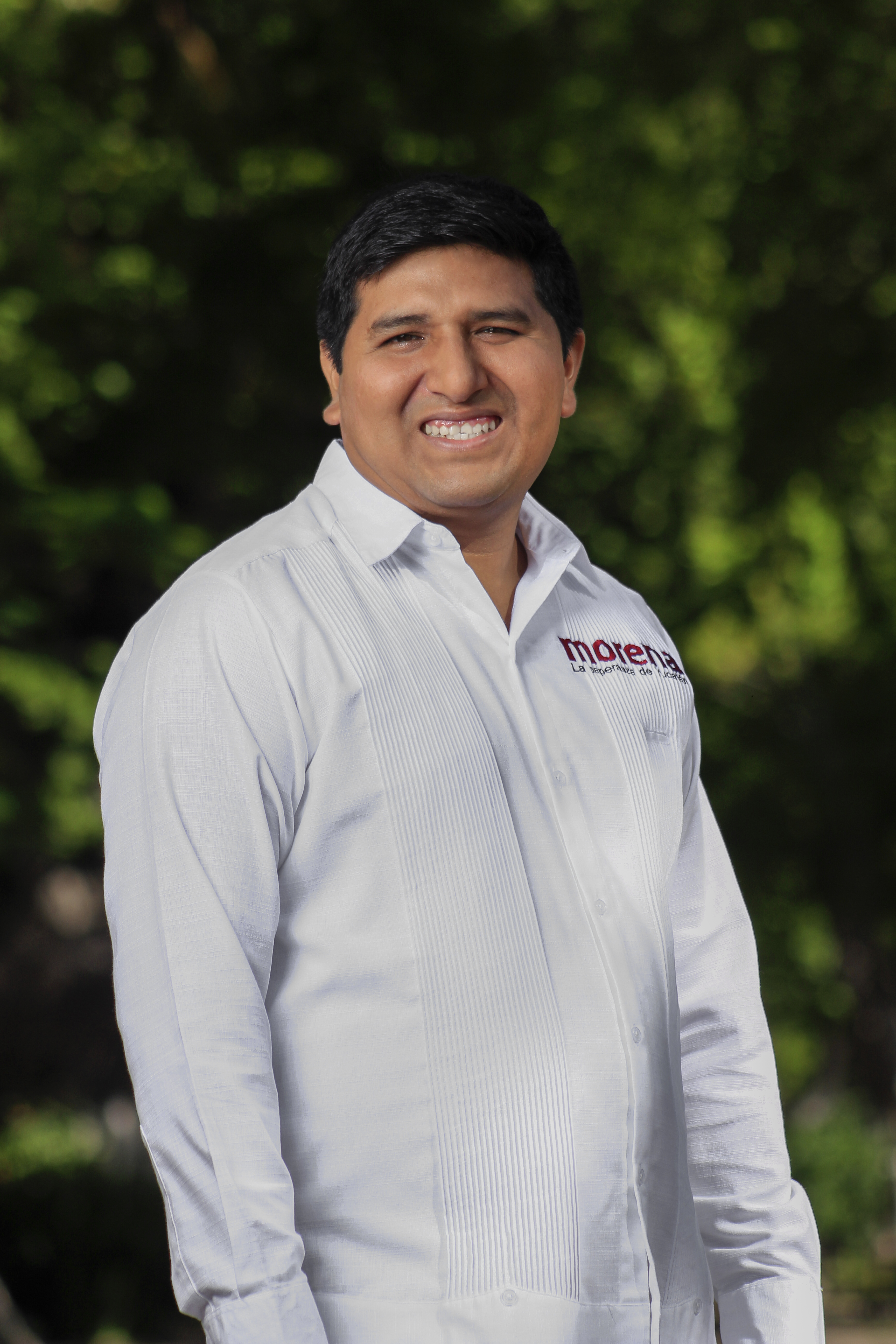 Rogerio Castro Vázquez, Coordinador Estatal de Organización de Morena Yucatán.